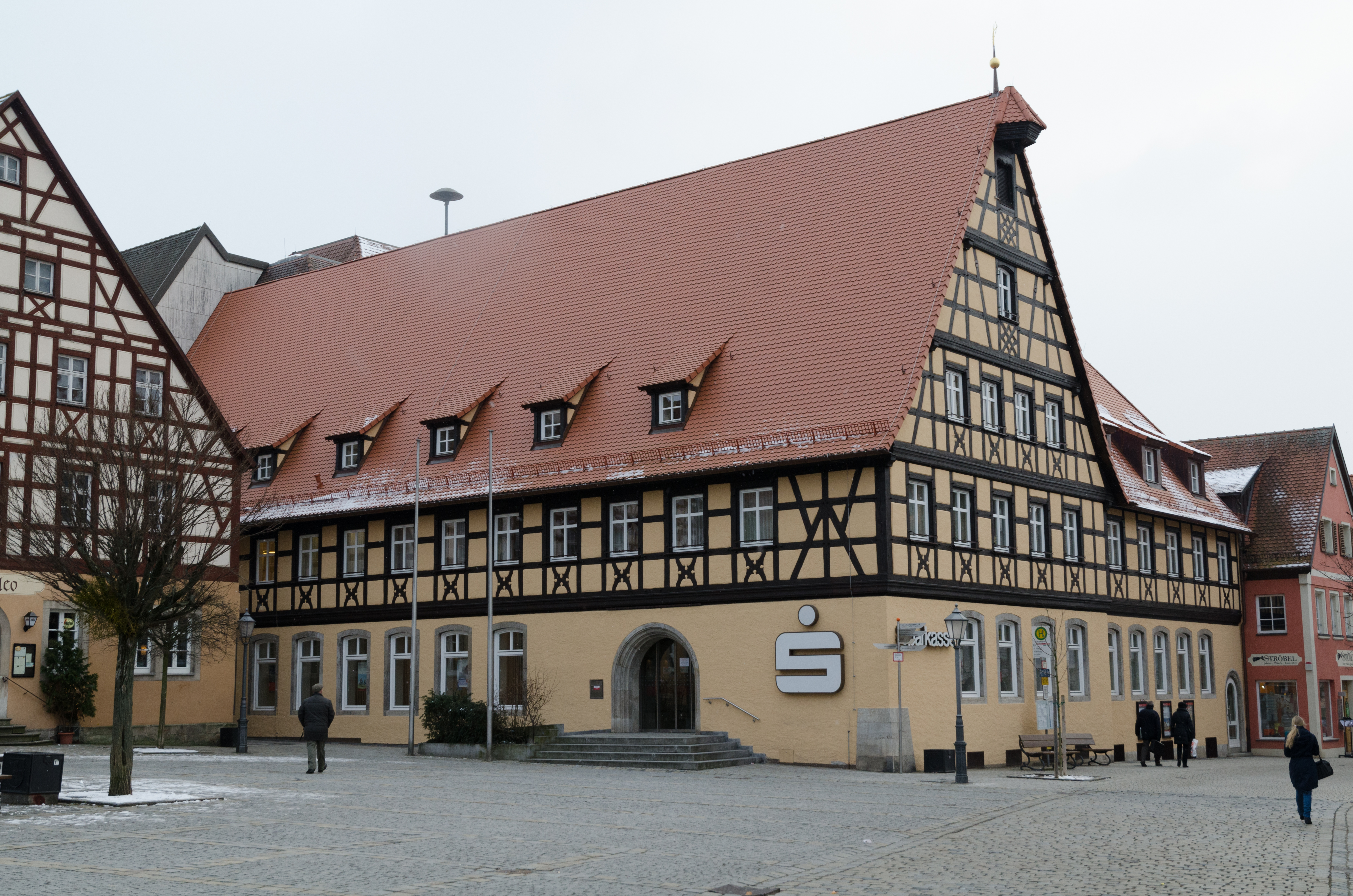 Neustadt an der Aisch, Wilhelmstraße 1